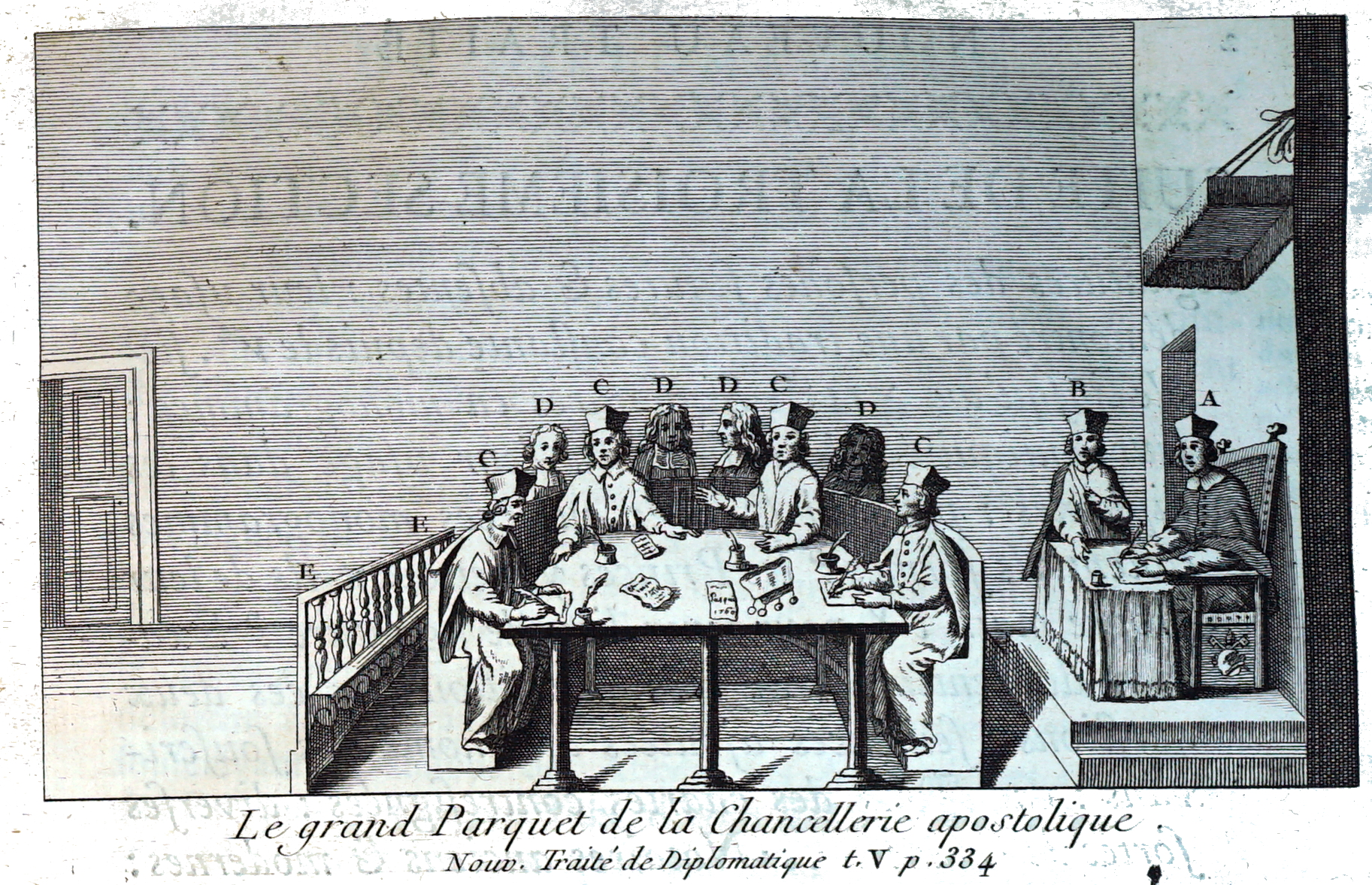 extrait de "Nouveau traité de diplomatique, ...".